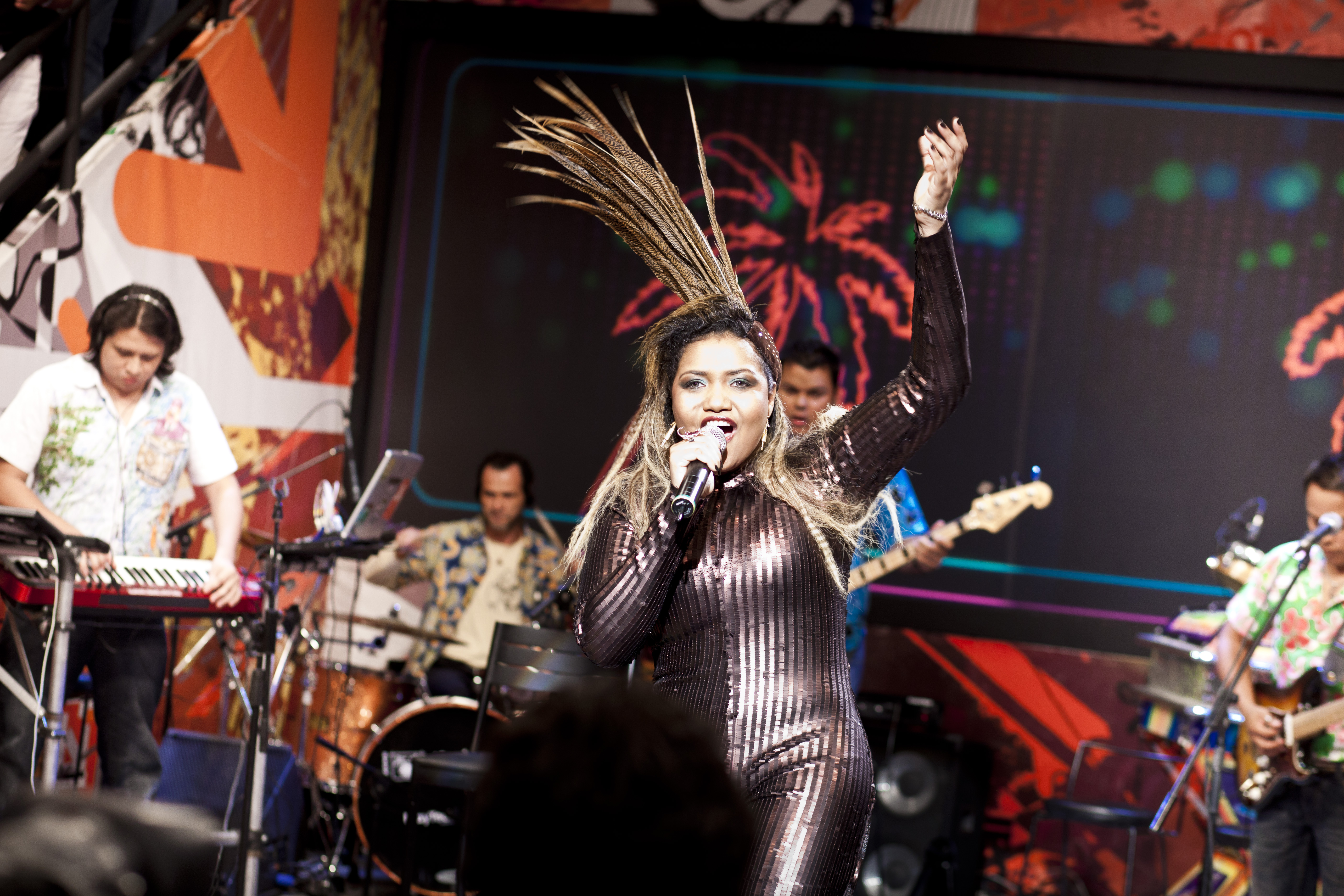 Gaby Amrantos na gravação do programa de televisão Altas Horas da TV Globo.